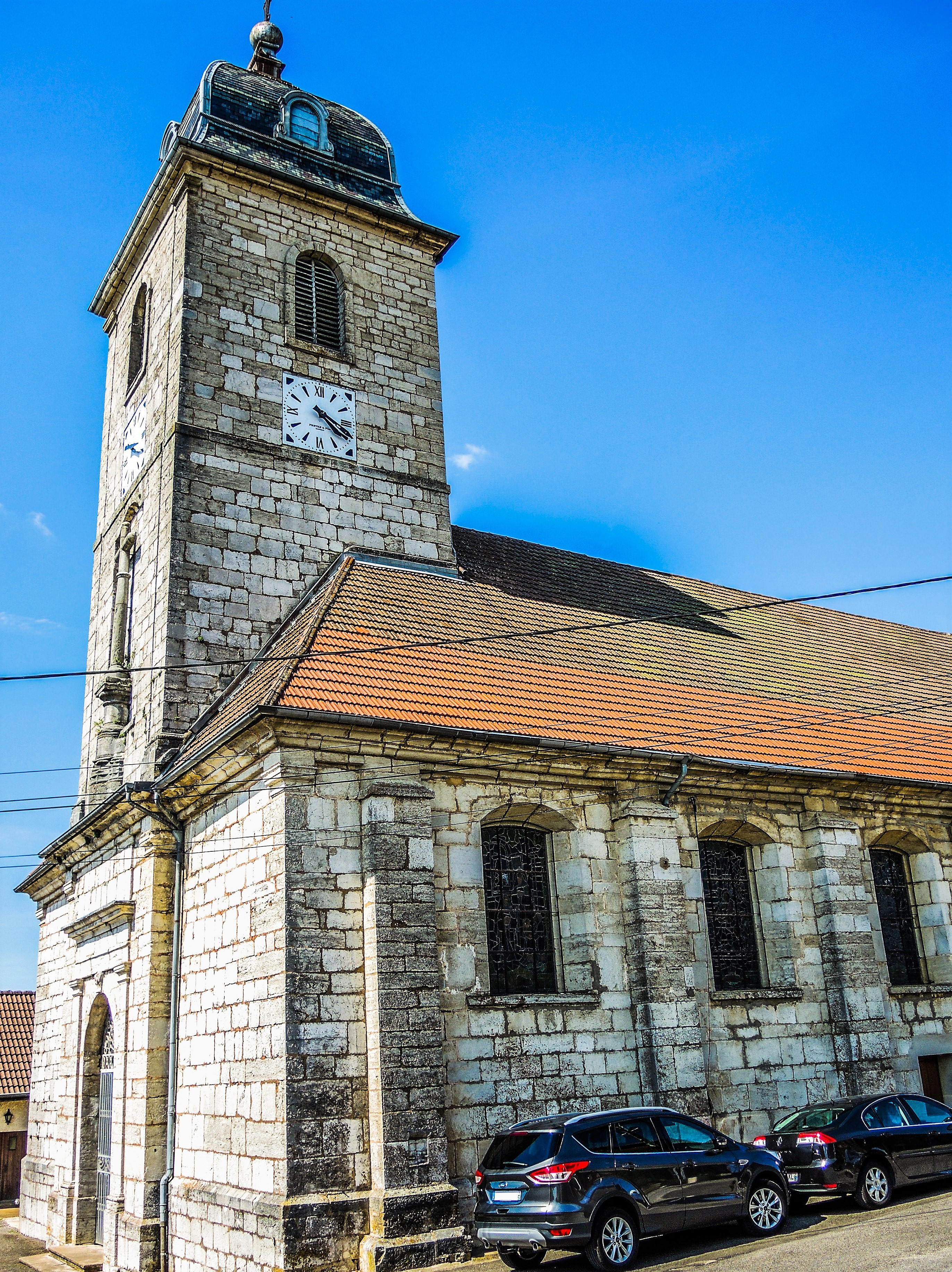 Eglise Saint-Léger de Bouclans. Doubs